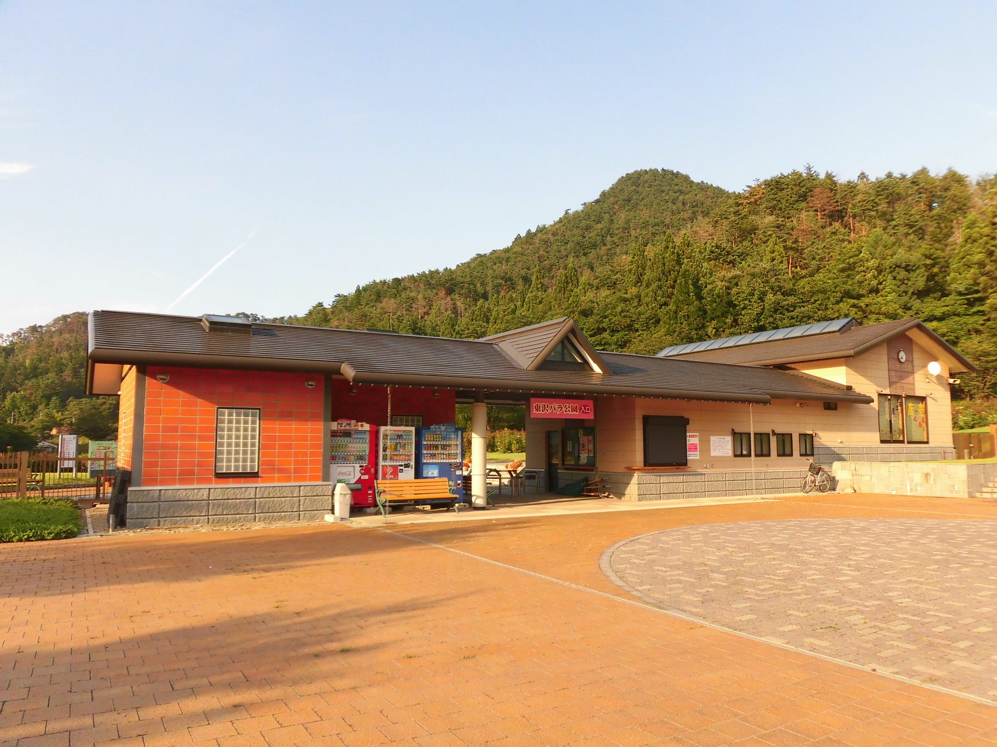 東沢バラ公園。山形県村山市に所在。 公園入口建物。